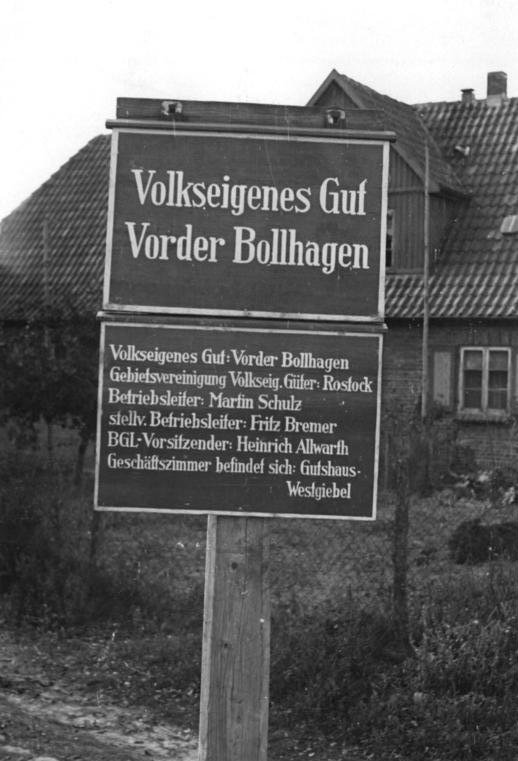 Schild des VEG Vorder Bollhagen UBz: Eingang zum volkseigenem Gut Vorder-Bollhagen Zentralbild -Pietsch seit 1949 Leihweise Illus Berlin W8